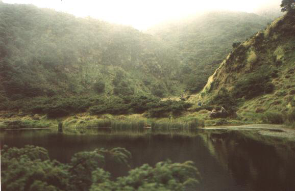 Lagoa Negra, Serra de Santa Bárbara, Angra do Heroísmo, ilha Terceira, Açores, Portugal.